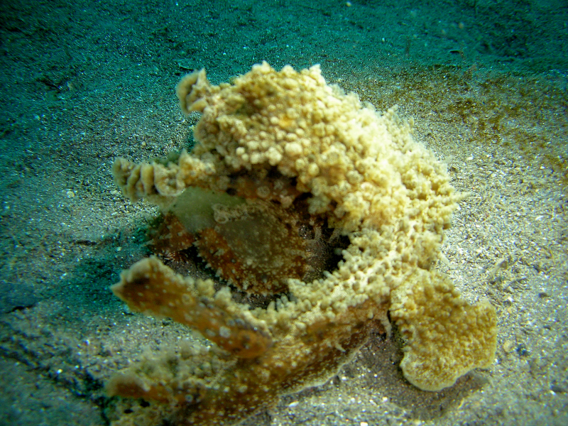 Melibe viridis en Lembeh, Indonesia